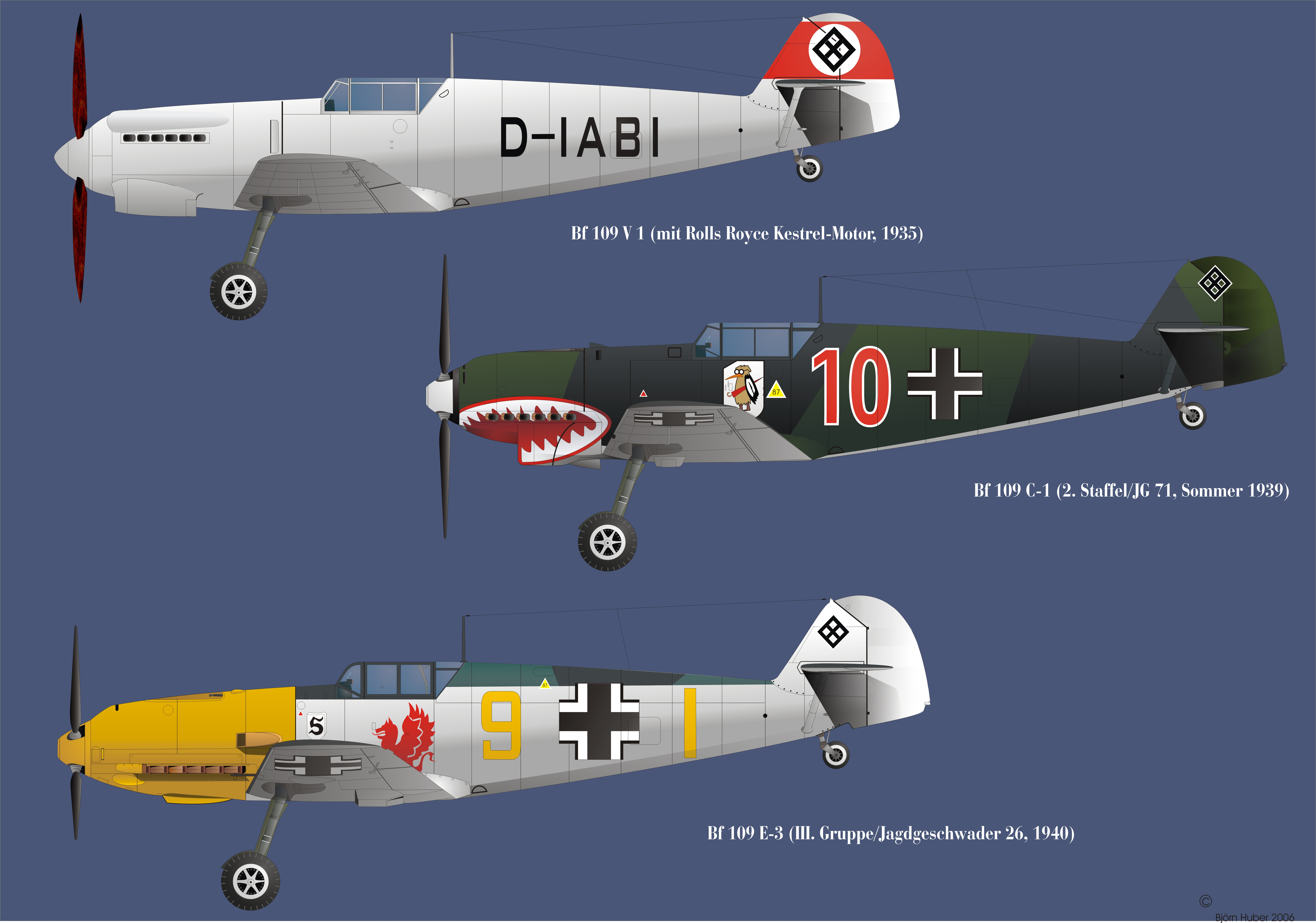 Bildbeschreibung: Bf 109 V1, C-1 und E-3 Quelle: Selbsterstellte Grafik (2006) Zeichner: Björn Huber Datum: 11.05.2006 Sonstiges: GNU-Lizenziert